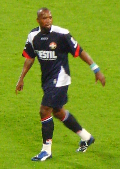 Ibrahim Kargbo, Sierra Leoons profvoetballer, tijdens een uitwedstrijd van Willem II tegen FC Utrecht - OpenStreetMap(Info)